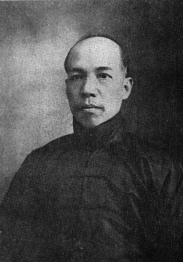 Лян Цичао на закате жизни